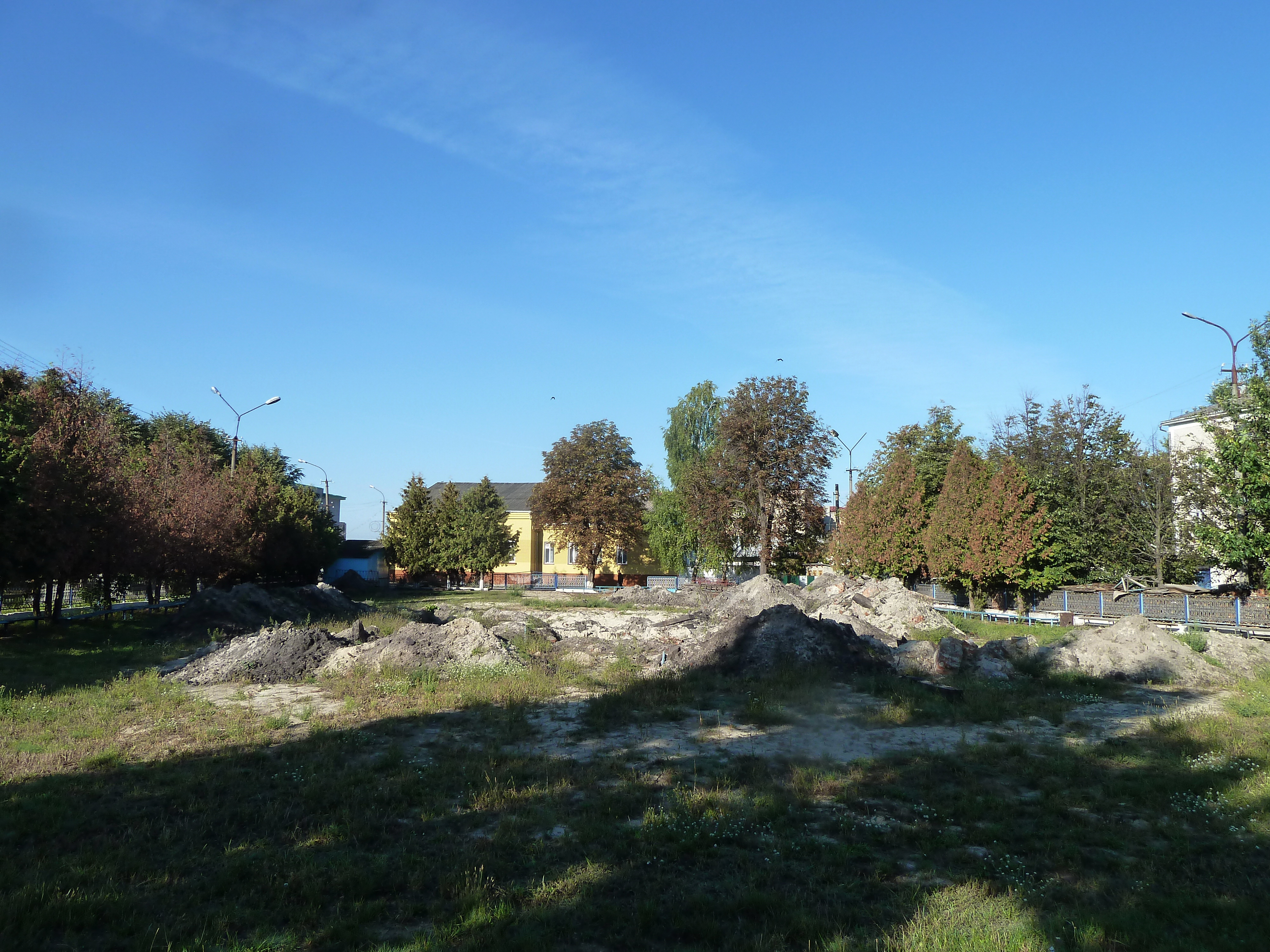 Церква святого пророка Іллі (дер.) (1700 рік) - руїни (згоріла 07.04.2015 року) - м. Камінь-Каширський (вул. Волі, 3) Волинська область Україна